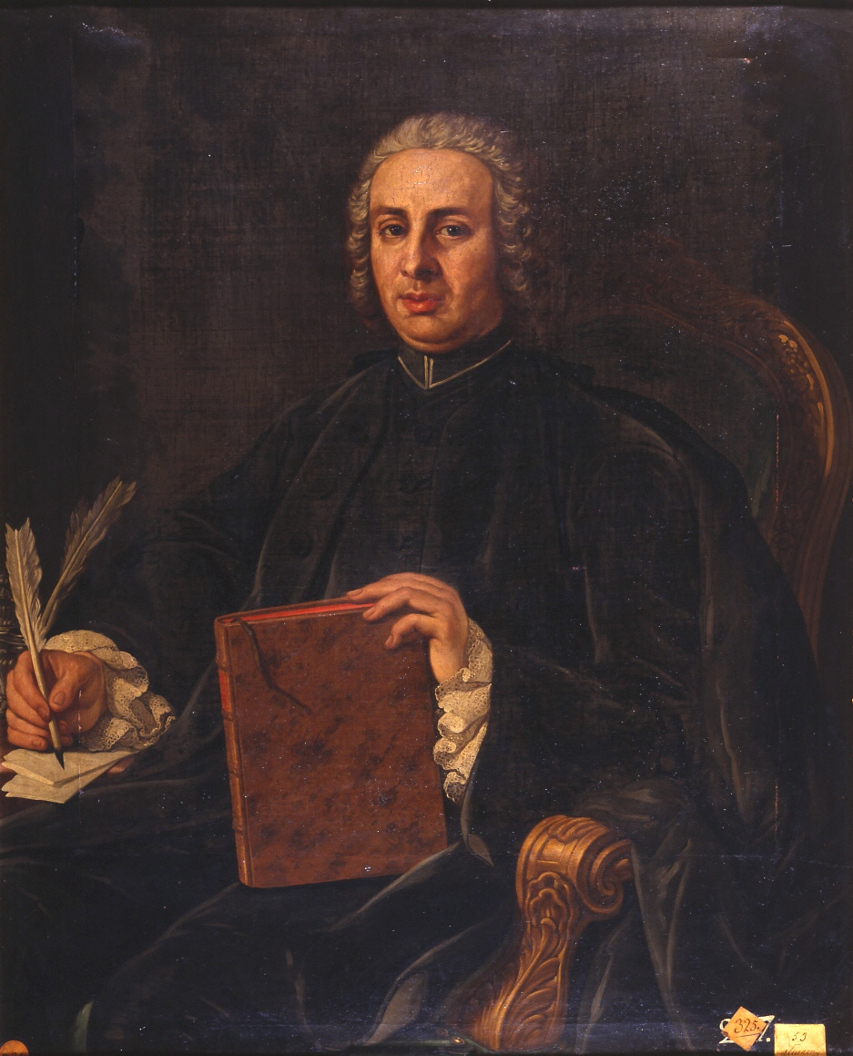 Retrato del sacerdote e historiador ilustrado español Ignacio de Hermosilla (1718-1794), que fue académico de la Real Academia Española y de la Real Academia de Bellas Artes de San Fernando.